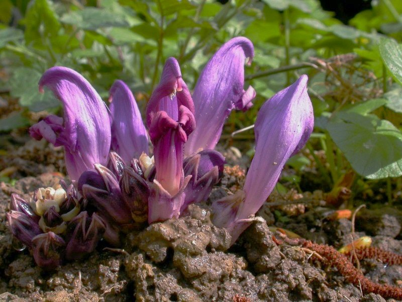 Lathraea clandestina, Cessac, Gironde, France